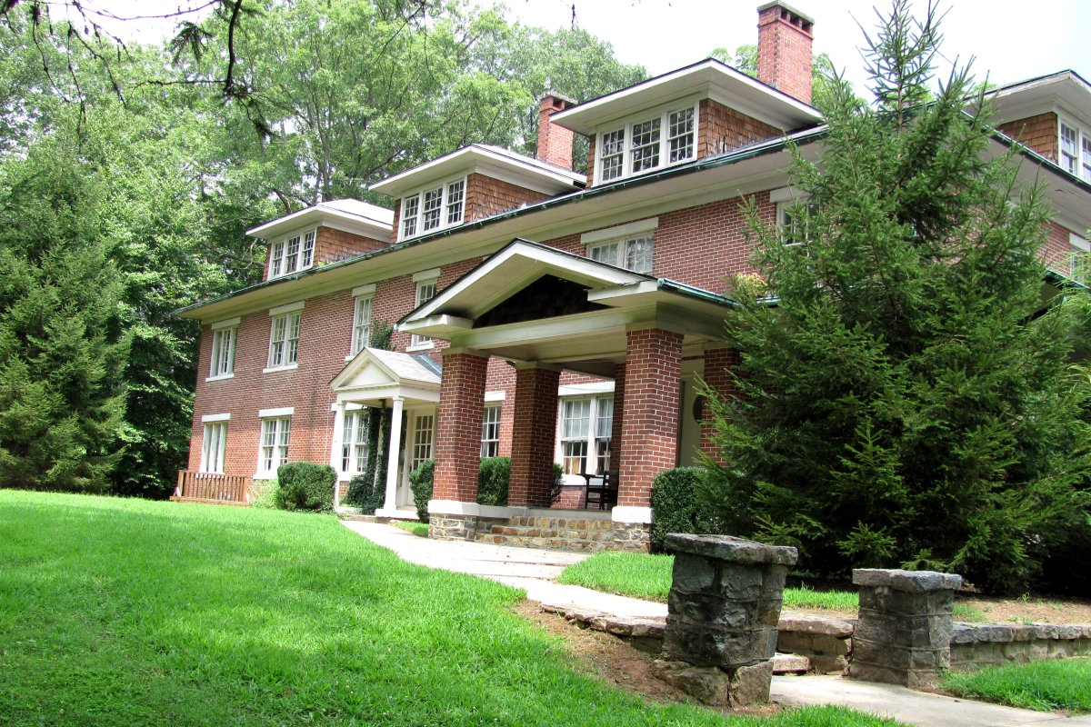 Brevard College, Ross Hall